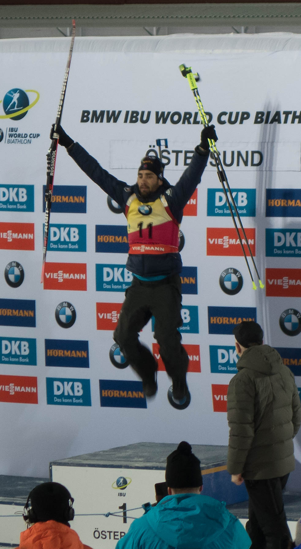 Segerhopp av Martin Fourcade efter sprinten vid Världscupen i Östersund 2016